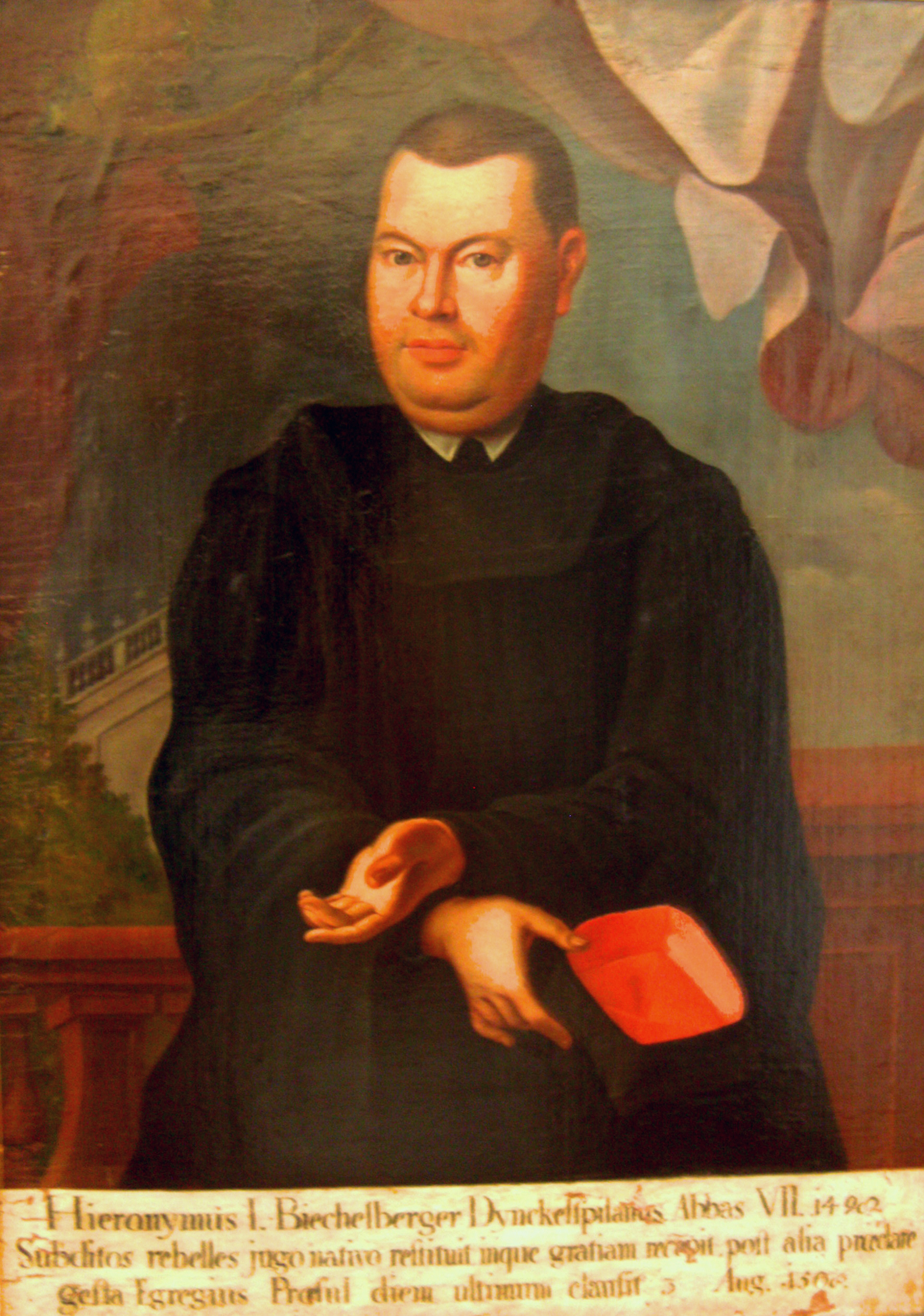 Biechelberger Hieronymus, Abt der Benediktinerreichsabtei Ochsenhausen